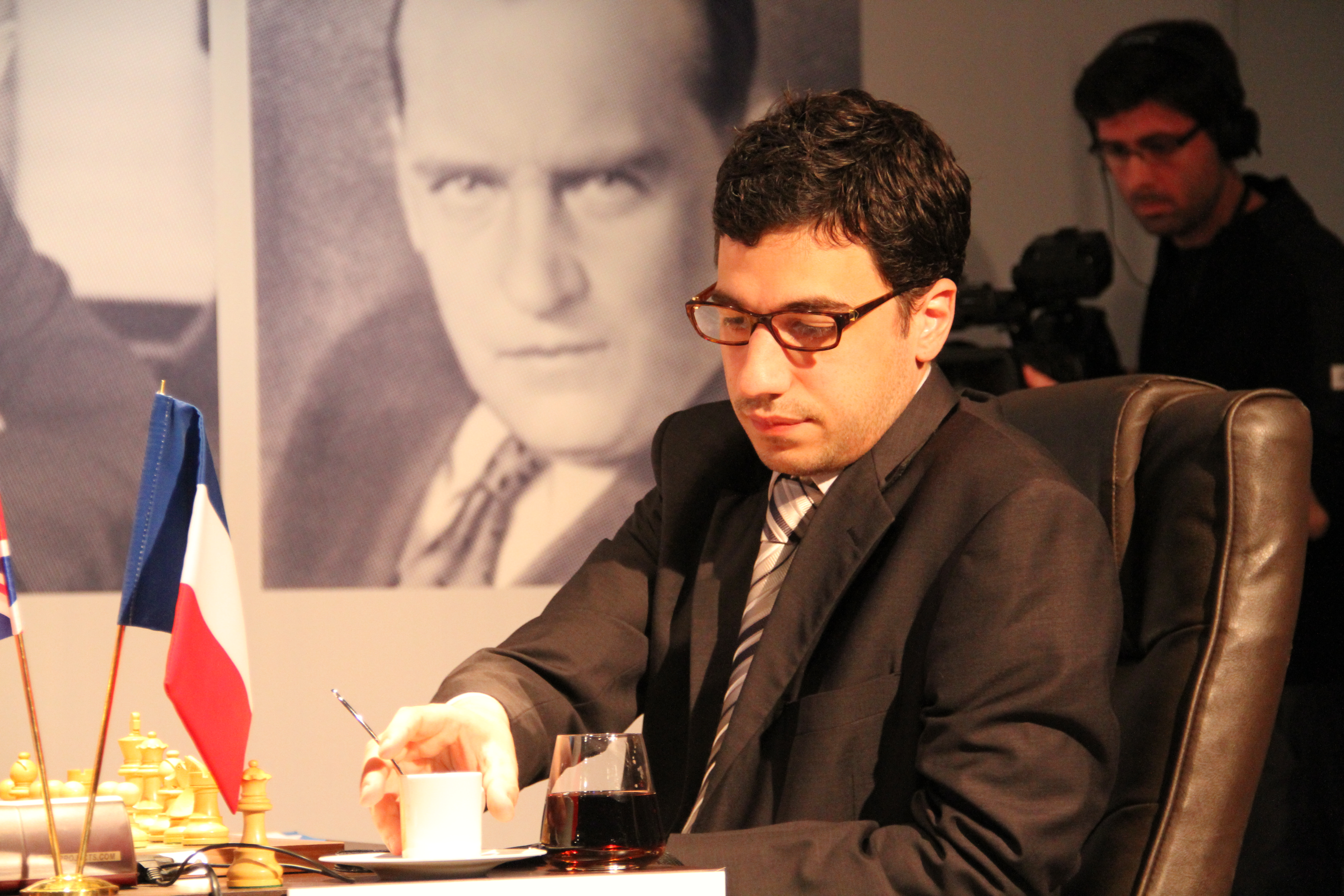 Laurent Fressinet au Mémorial Alekhine 2013 (Paris)